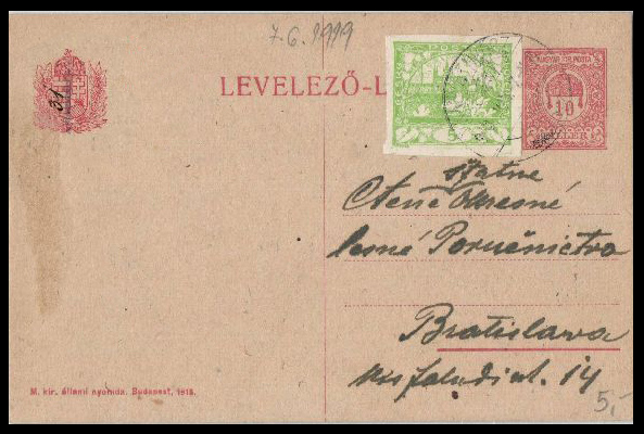 Почтовая карточка Королевства Венгрия, франкированная маркой Чехословакии из серии "Градчаны".